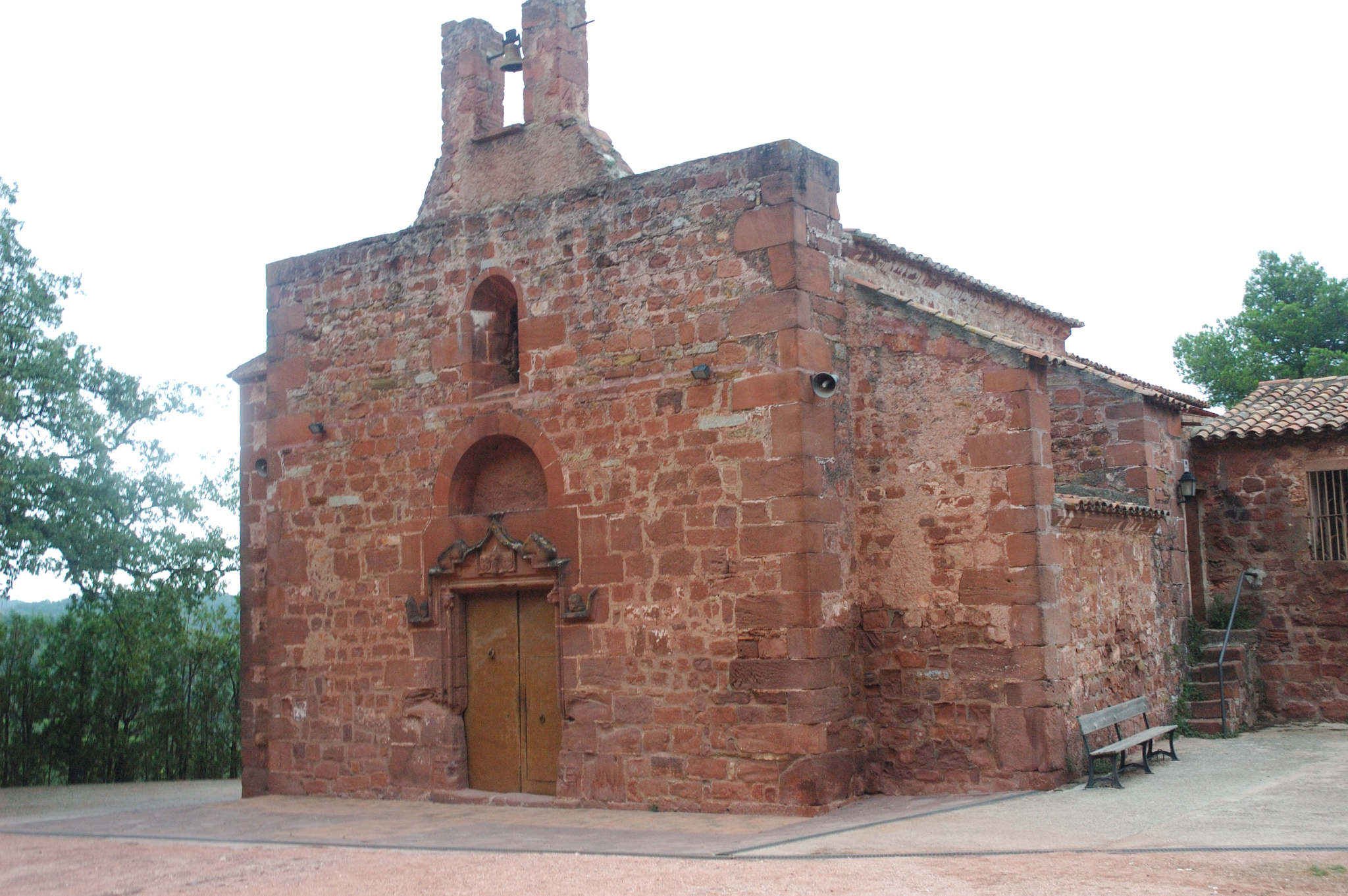 Església de Bruguers